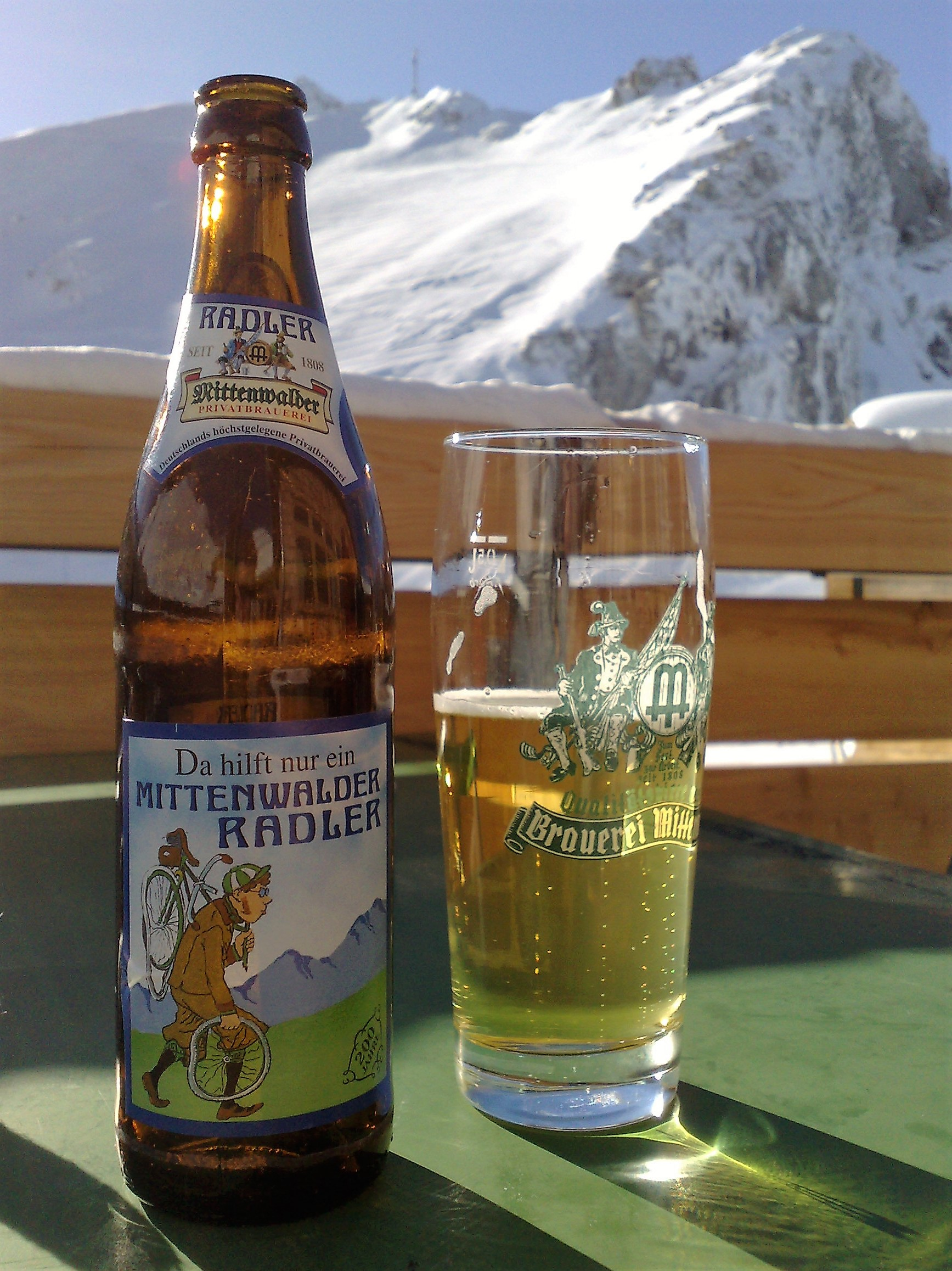 Eine Flasche und ein Glas mit "Mittenwalder Radler" aus der Brauerei Mittenwald in Mittenwald, Bayern.